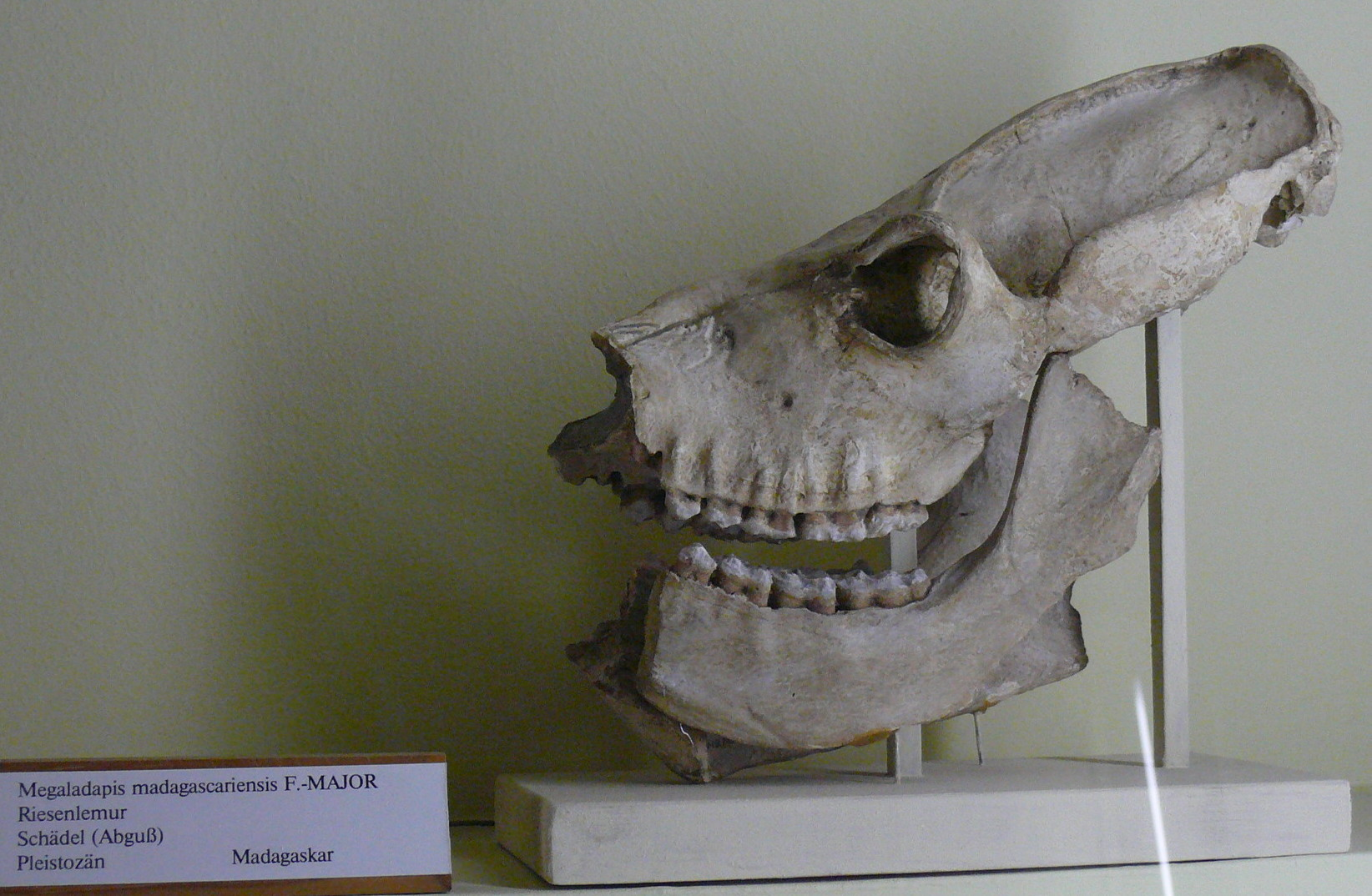 Abguss des Schädels von Megaladaspis madagascariensis (Riesenlemur)